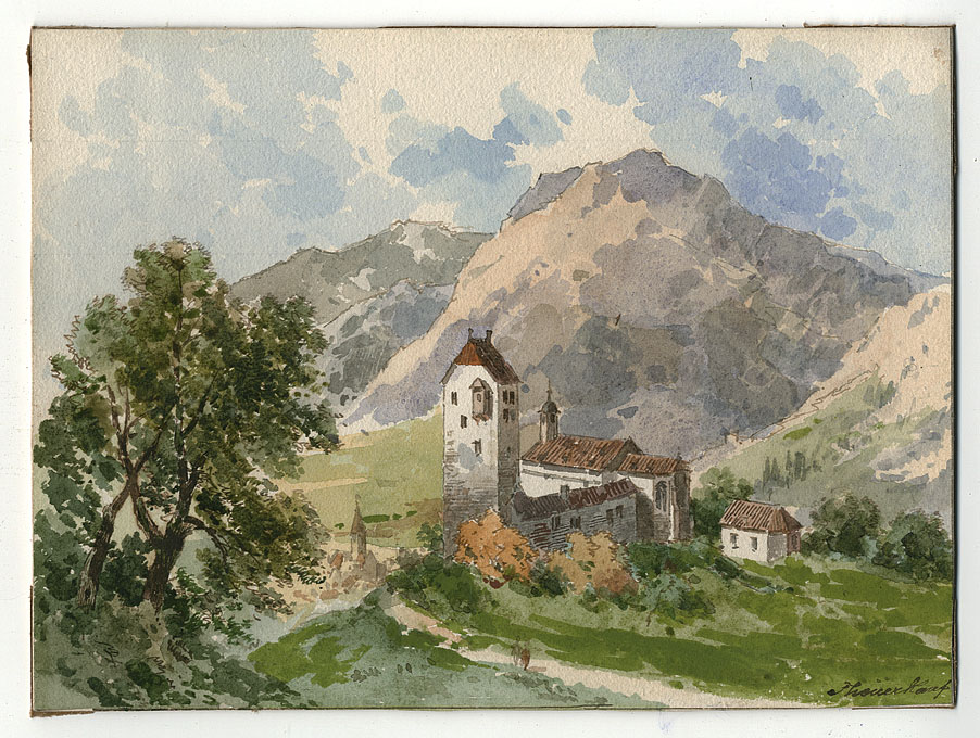 Blick auf die Rest einer Burg (in Tirol?), unten links ein kleines Städtchen. Aquarell, unten rechts signiert “Theuerkauf”, Bildgröße: 14,5 × 19,5 cm